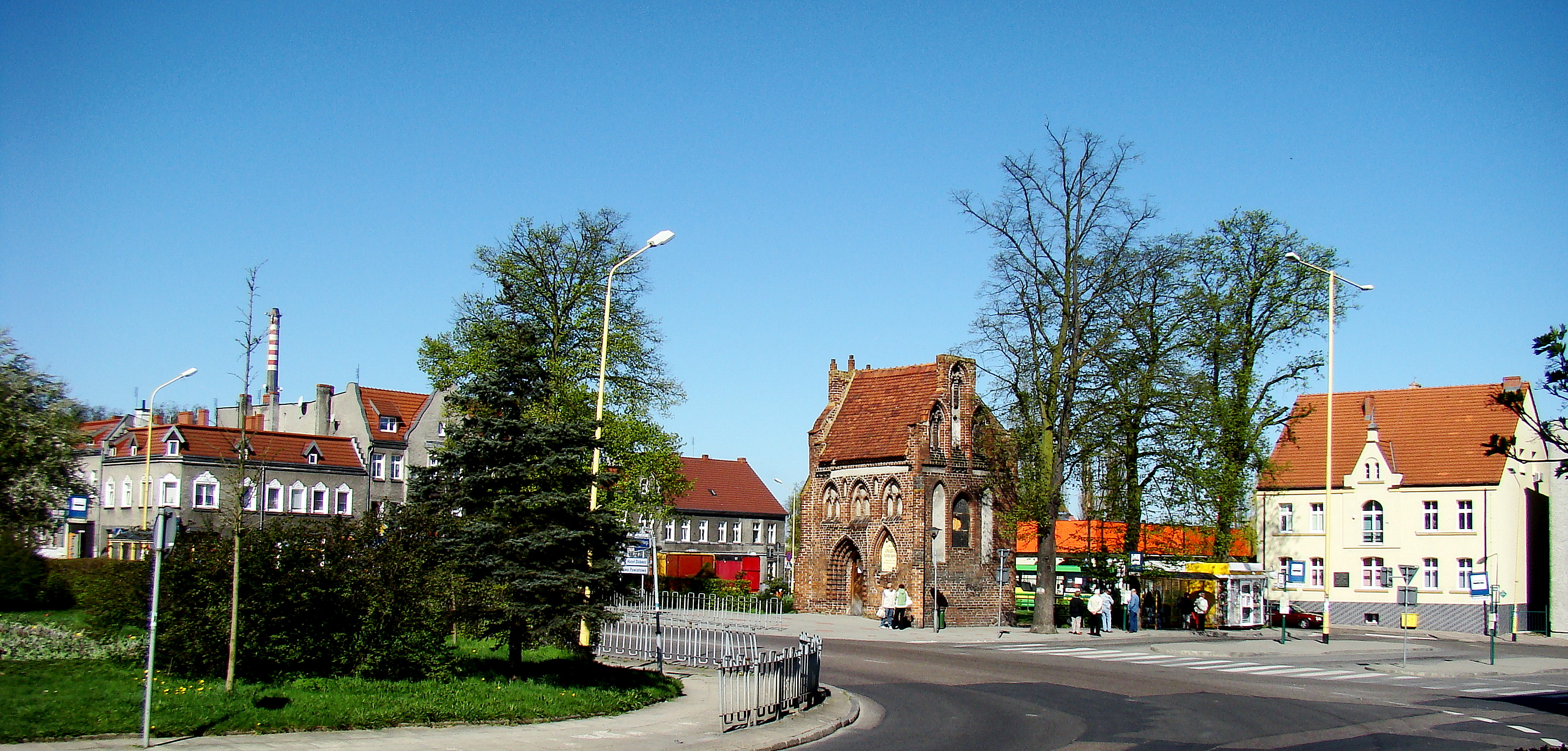 Rynek Starego Miasta w Policach (Police, Województwo zachodniopomorskie), Polska